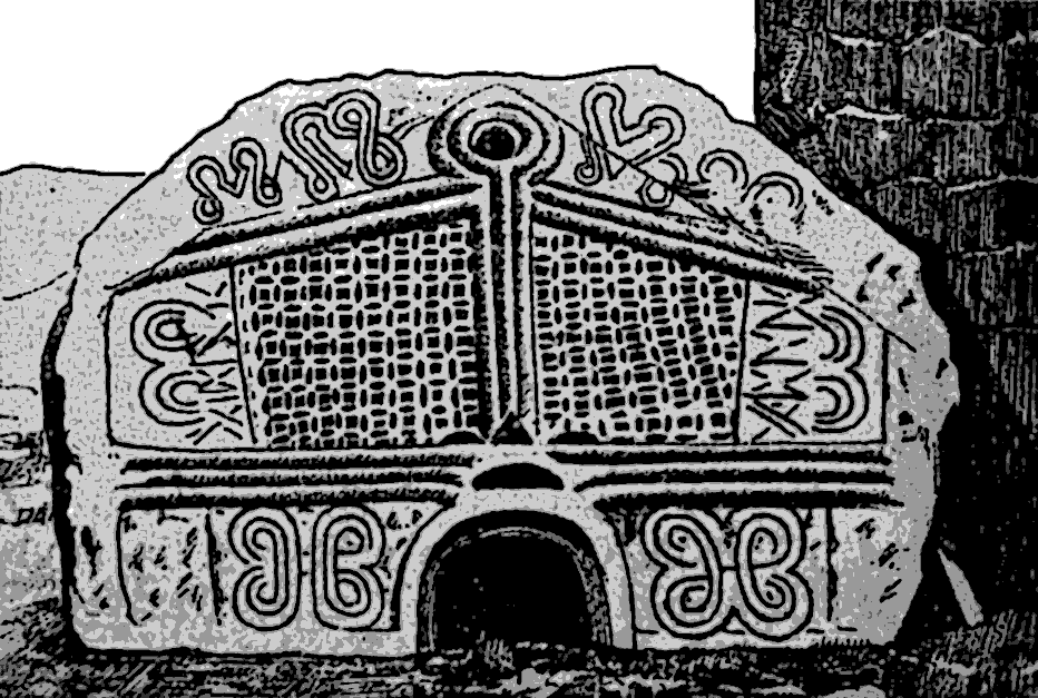 Pedra Formosa de un edificio de la Citânia de Sabroso en São Lourenço de Sande (Portugal)